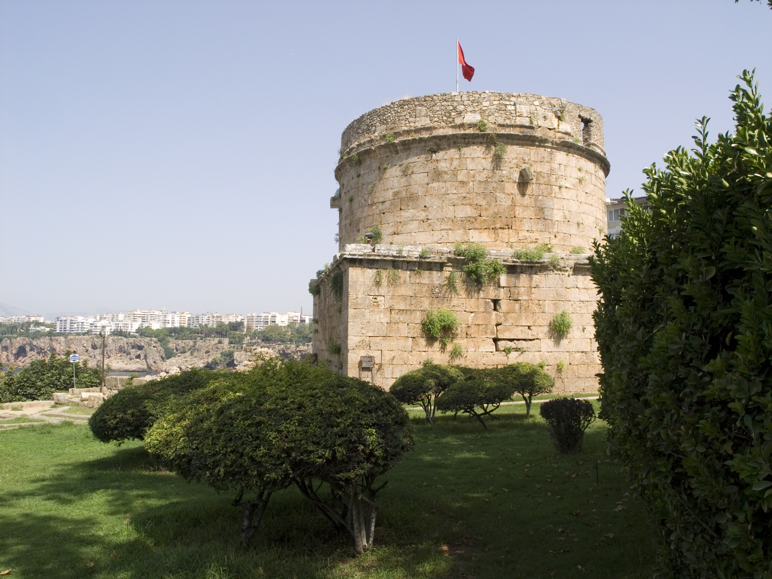 Турция, Анталья - Башня Хыдырлык